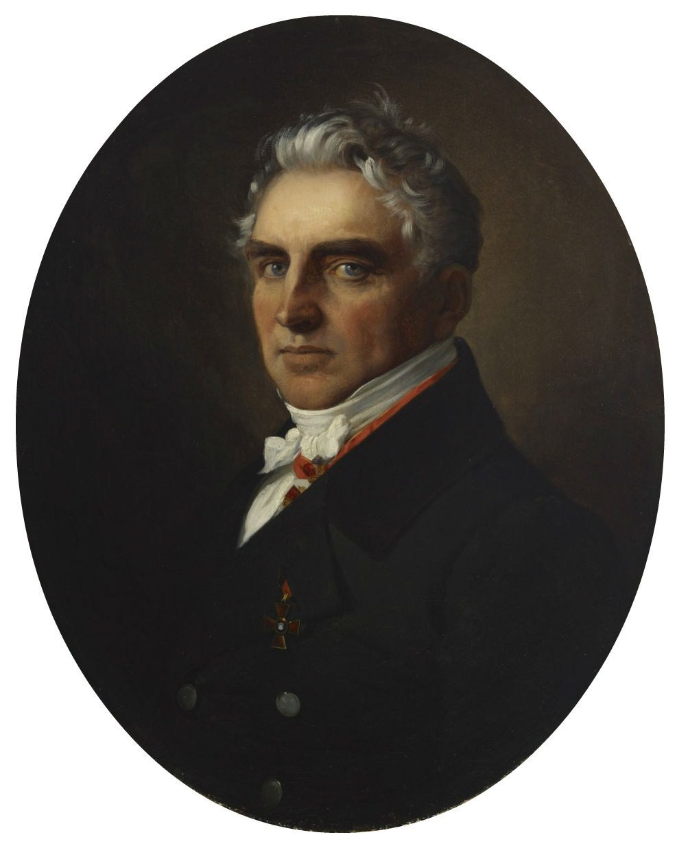 Lääkintöhallituksen johtaja ja professori Carl Daniel von Haartman (1792–1877).